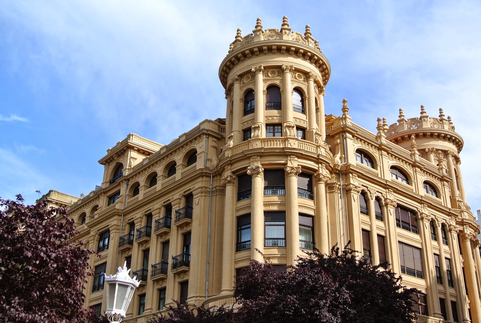 Deustuko San Pedro-Erribera, Bilbo, Bizkaia, Spain